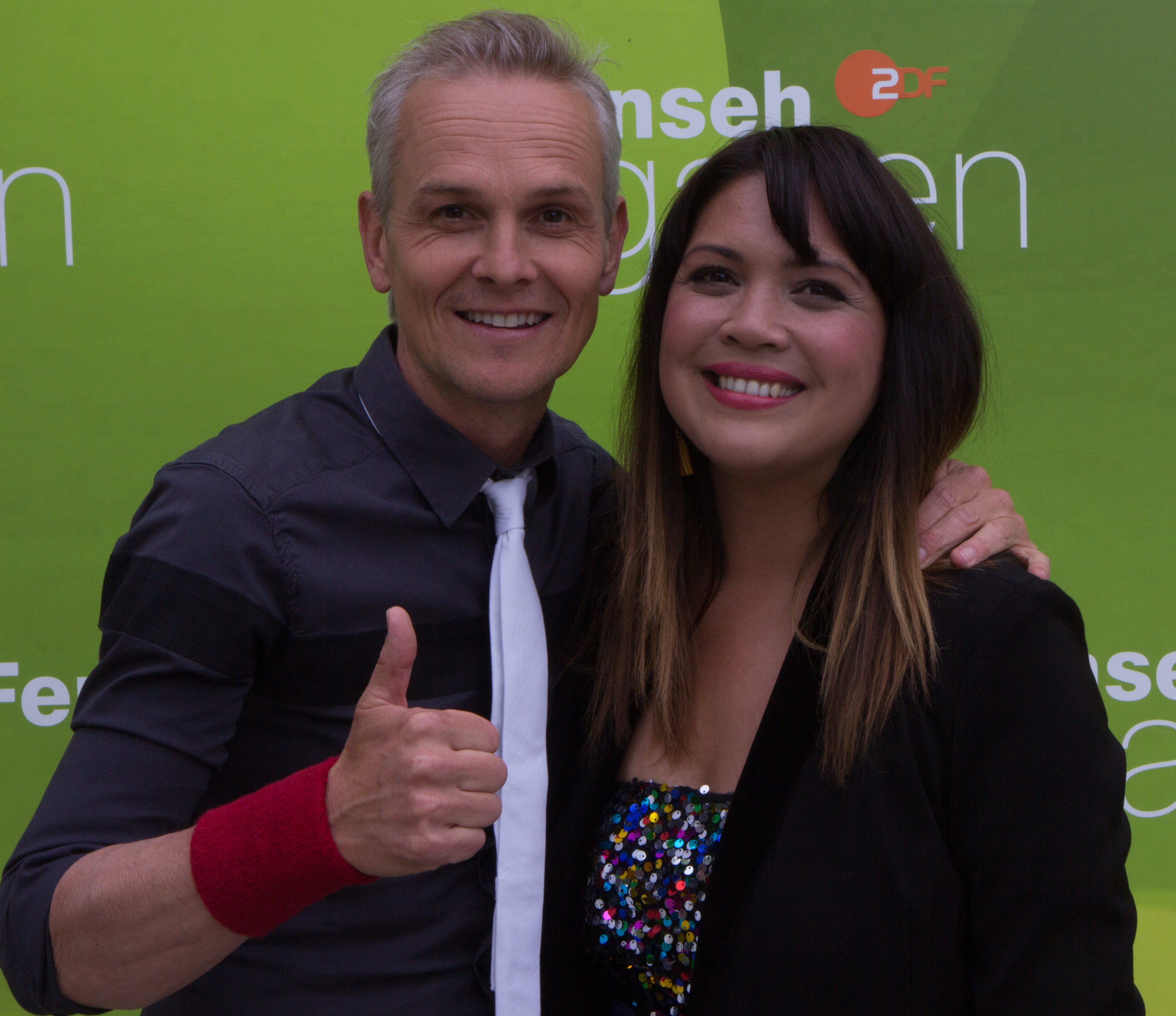 Hermes House Band als Gast beim ZDF-Fernsehgarten am 13. Mai 2018 in Mainz.